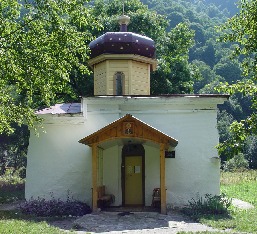 Южный Зеленчукский храм, Действующий храм